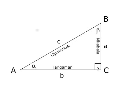 Kiswahili: nimeiswahilisha kutokana na Rtriangle.svg